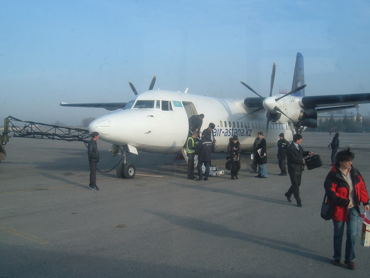 Air Astana